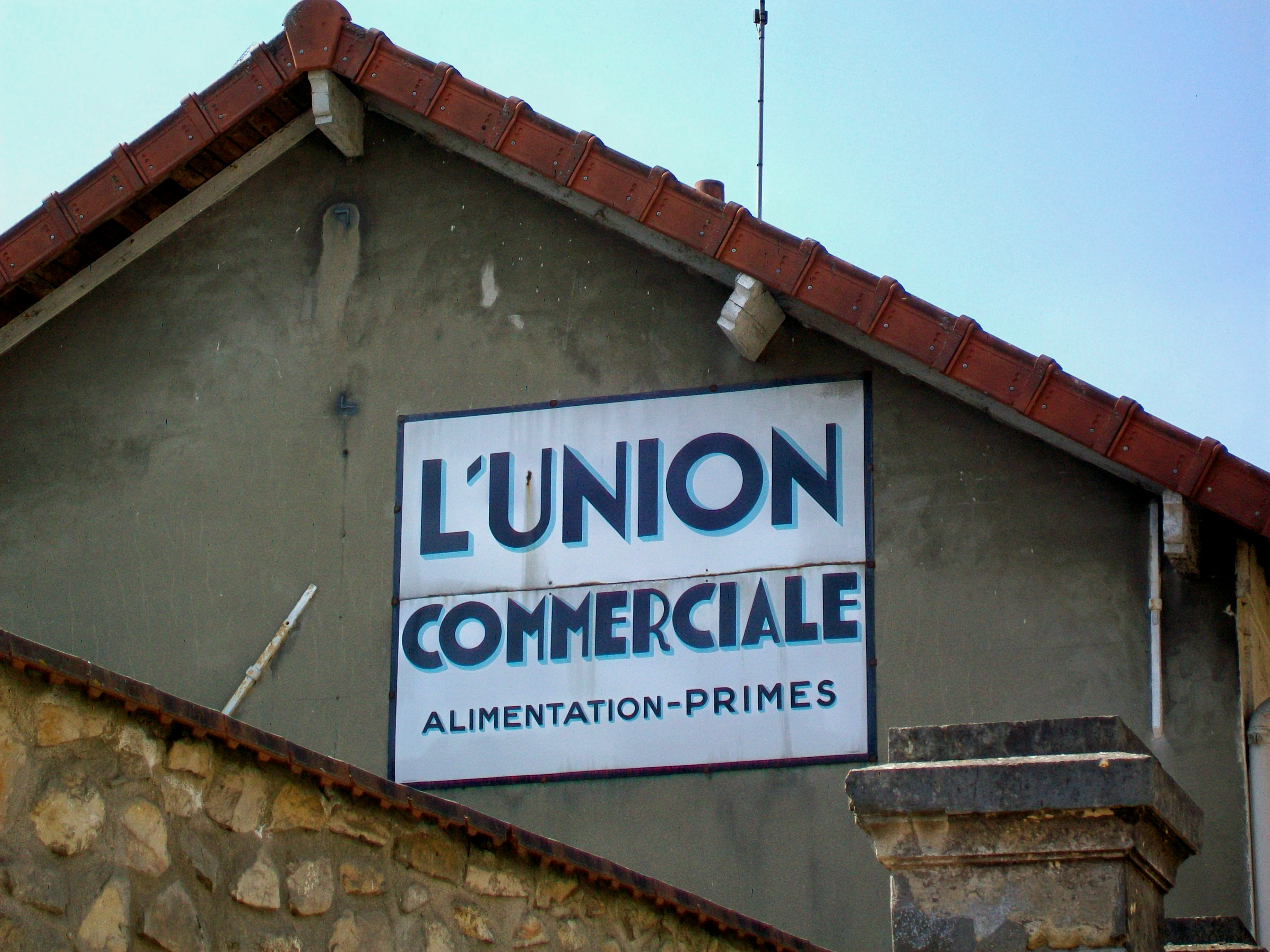 Sur le pignon de l'épicerie rue de Paris, ce logo de l'Union Commerciale (ancêtre de Système U) a survecu